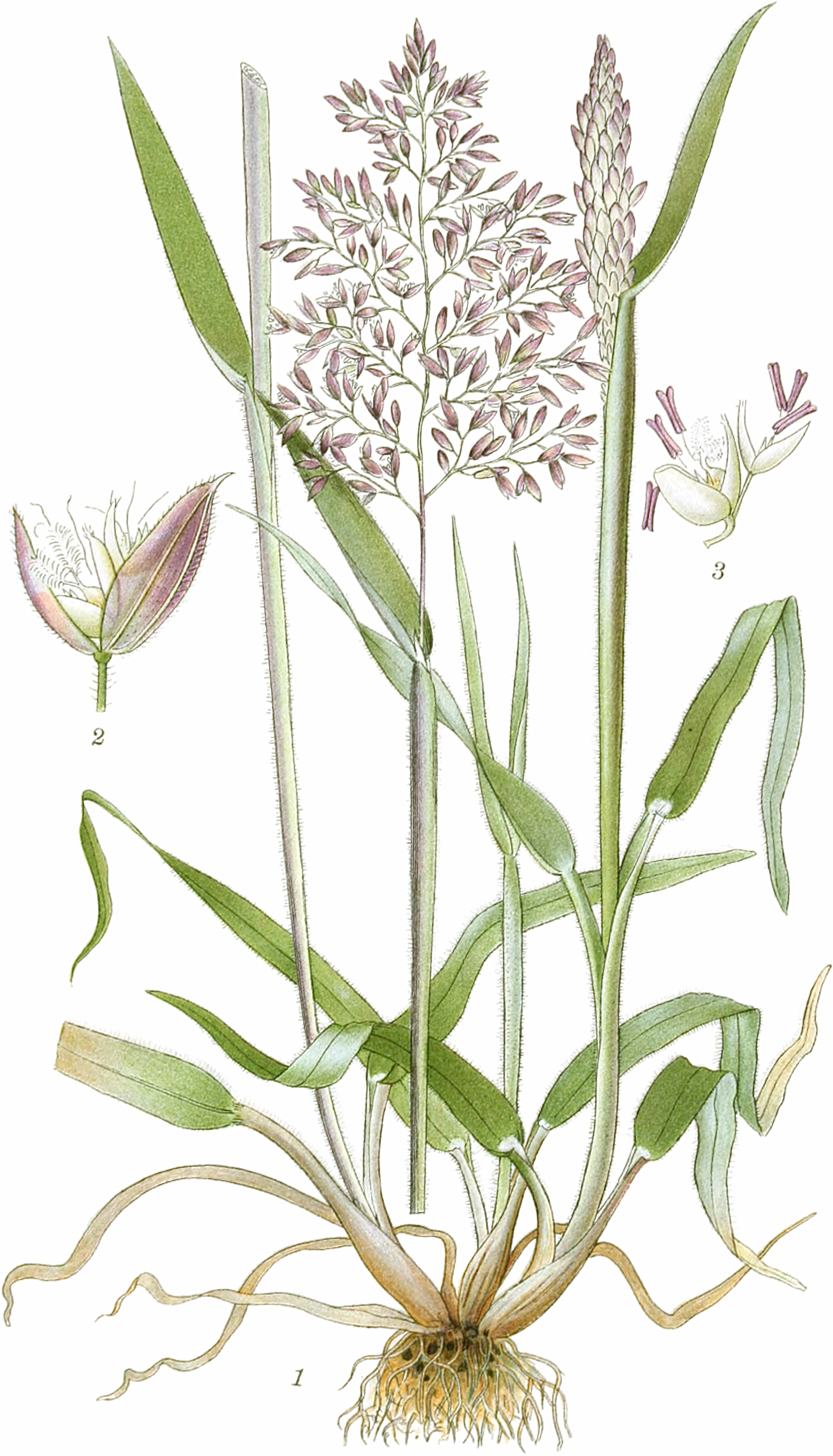 Mentz, A.; Ostenfeld, C. H.: Bilder der Nordflora. Band 2, 1917ff.Wolliges Honiggras. Holcus lanatusTaf. 464. Fig. 1. Individuum, von dem ein oberer Strohalm abgeschnitten und auf der Figur nach unten verschoben wurde. Fig. 2. Ährchen (5/1). Fig. 3. Desgleichen zwei blühenden Ährchen, jedoch ohne Hüllspelze (5/1).